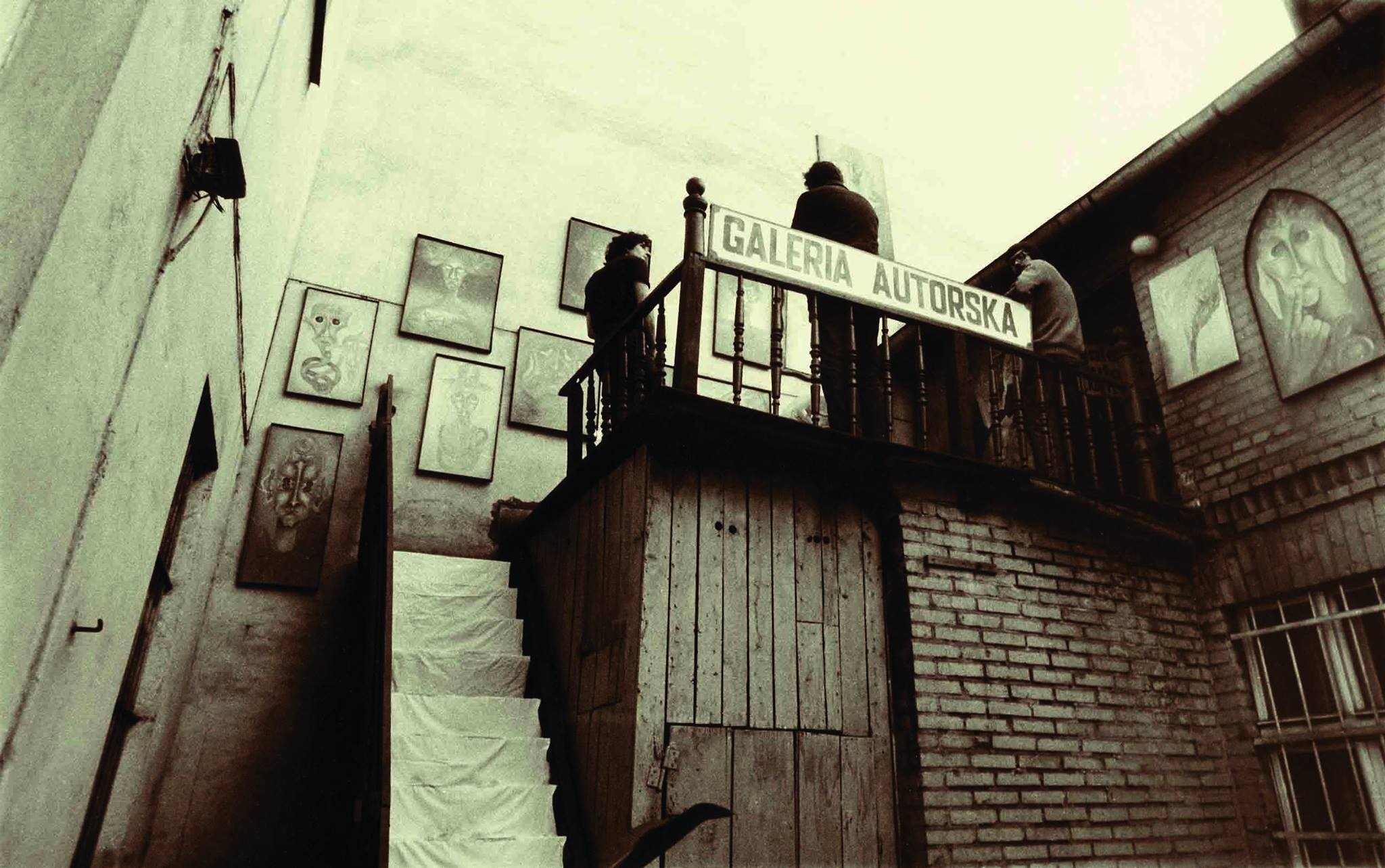 Fotografia T. Żmijewskiego przekazana do użytku Galerii Autorskiej